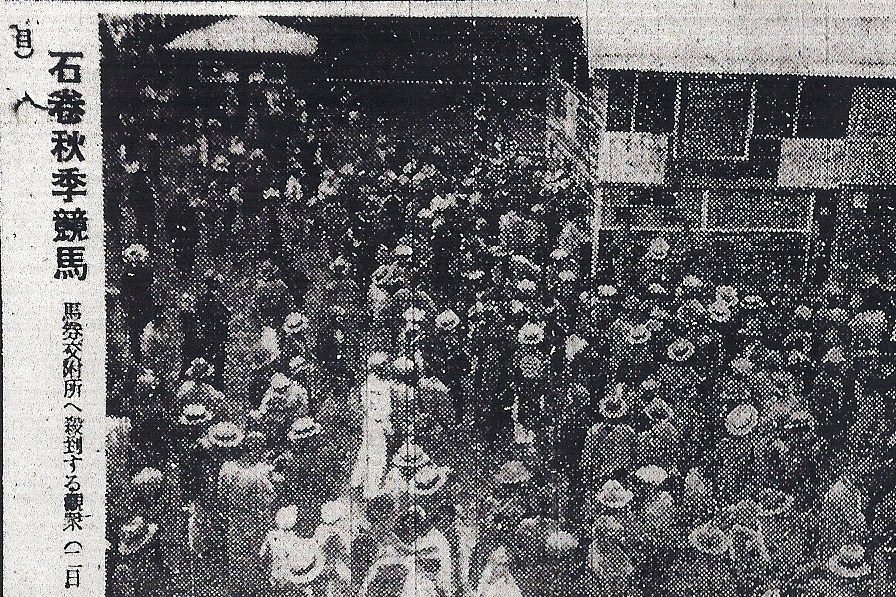 昭和6年10月4日に撮影された2012年5月現在著作権保護期間満了している写真にコントラスト調整を加えました。